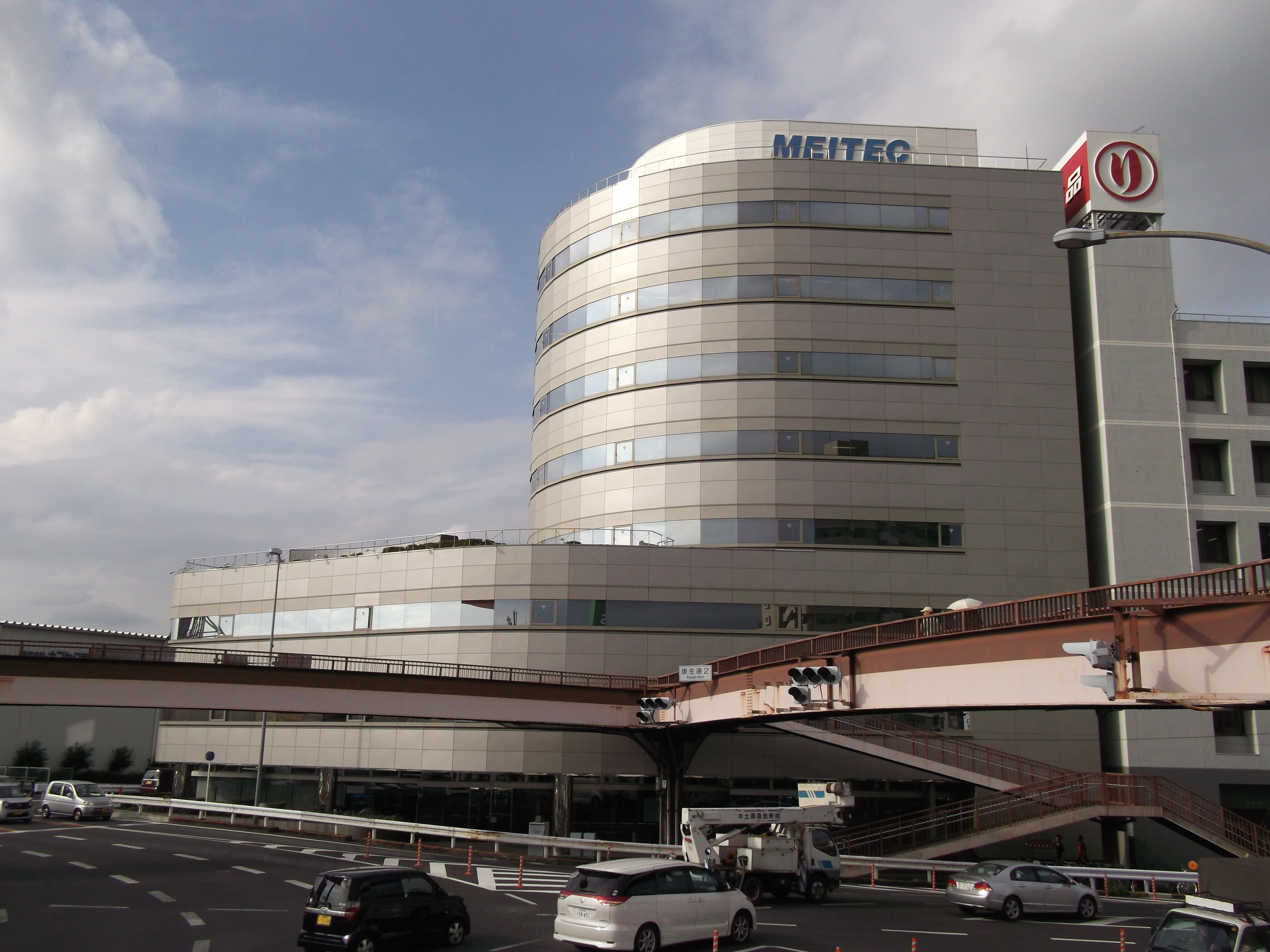 名古屋市西区康生通のメイテック名古屋本社を南側公道より撮影